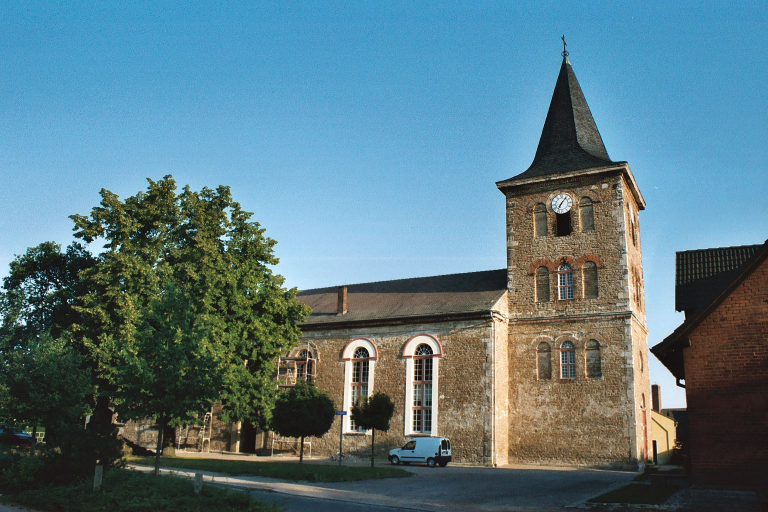 Bad Dürrenberg, Laurentiuskirche, gelegen an der Gasse "Kirchberg", klassizistischer Bau von 1831